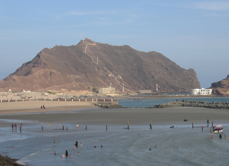 Blue Beach View